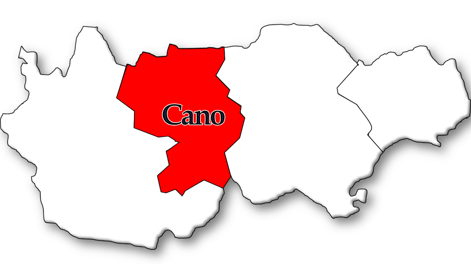 População